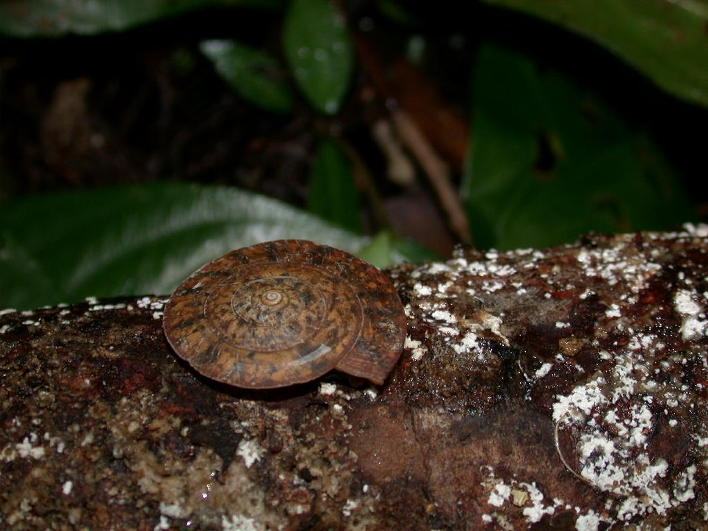 Videnoida horiomphala：オオカサマイマイ 2007/08/09 沖縄本島北部：Okinawa Island, Japan